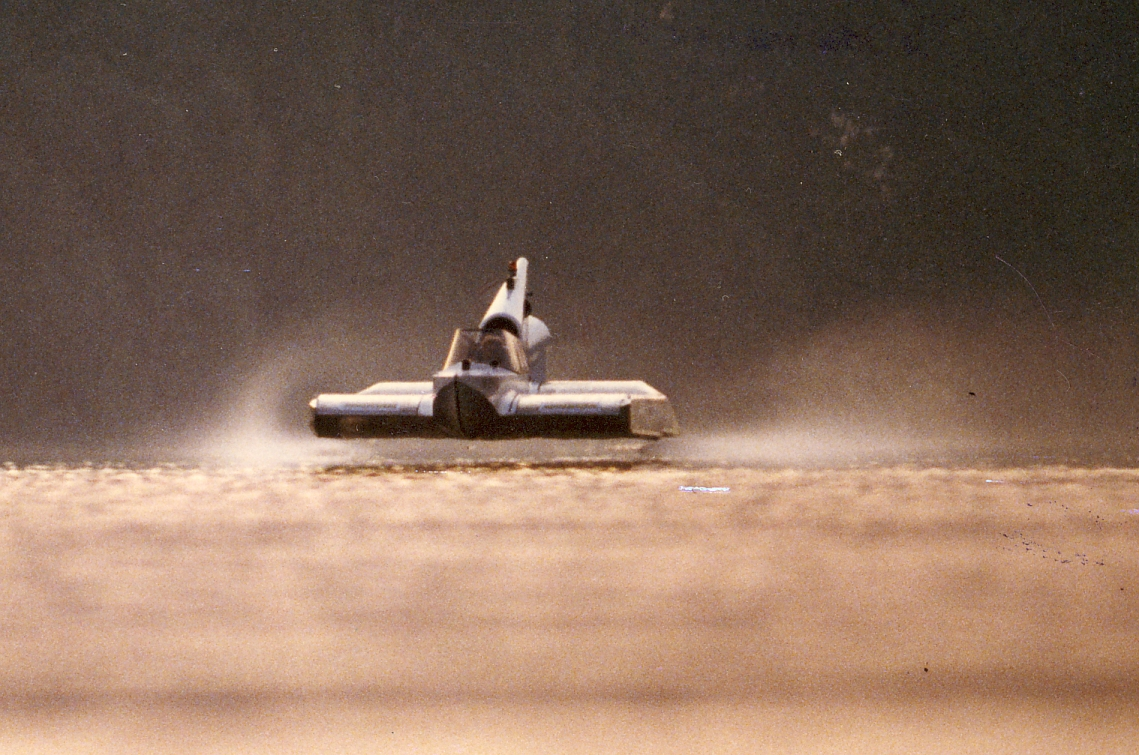 Jörg1 im Bodeneffektflug in ca 40 cm Höhe